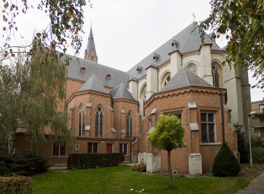 Parochiekerk Sint-Martinus, Duffel